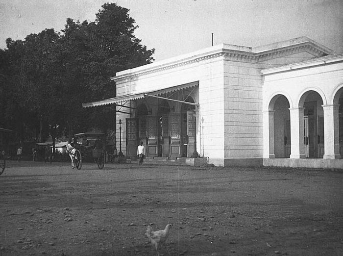 Foto. Het station van Buitenzorg